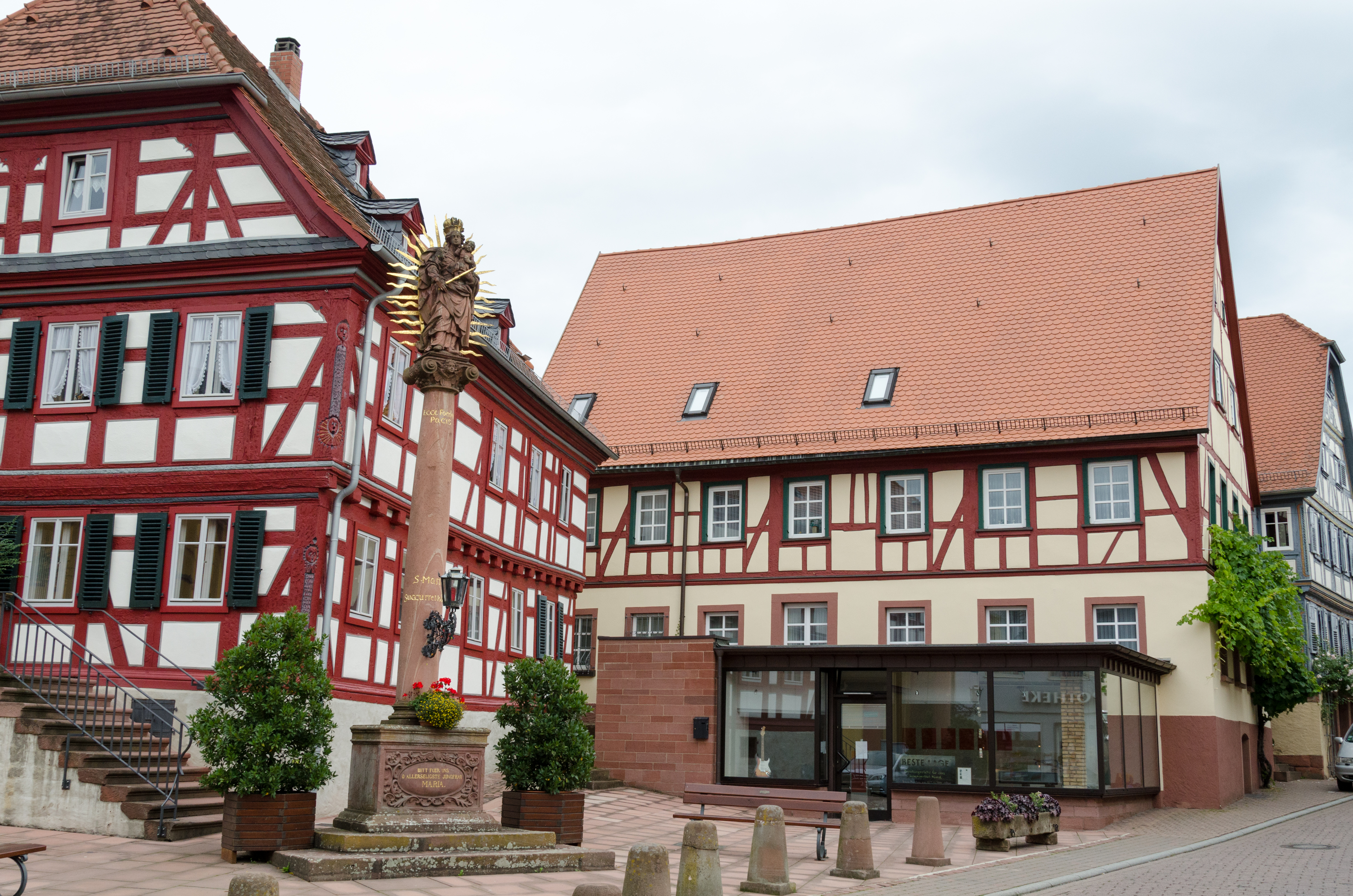 Amorbach, Pfarrgasse 1